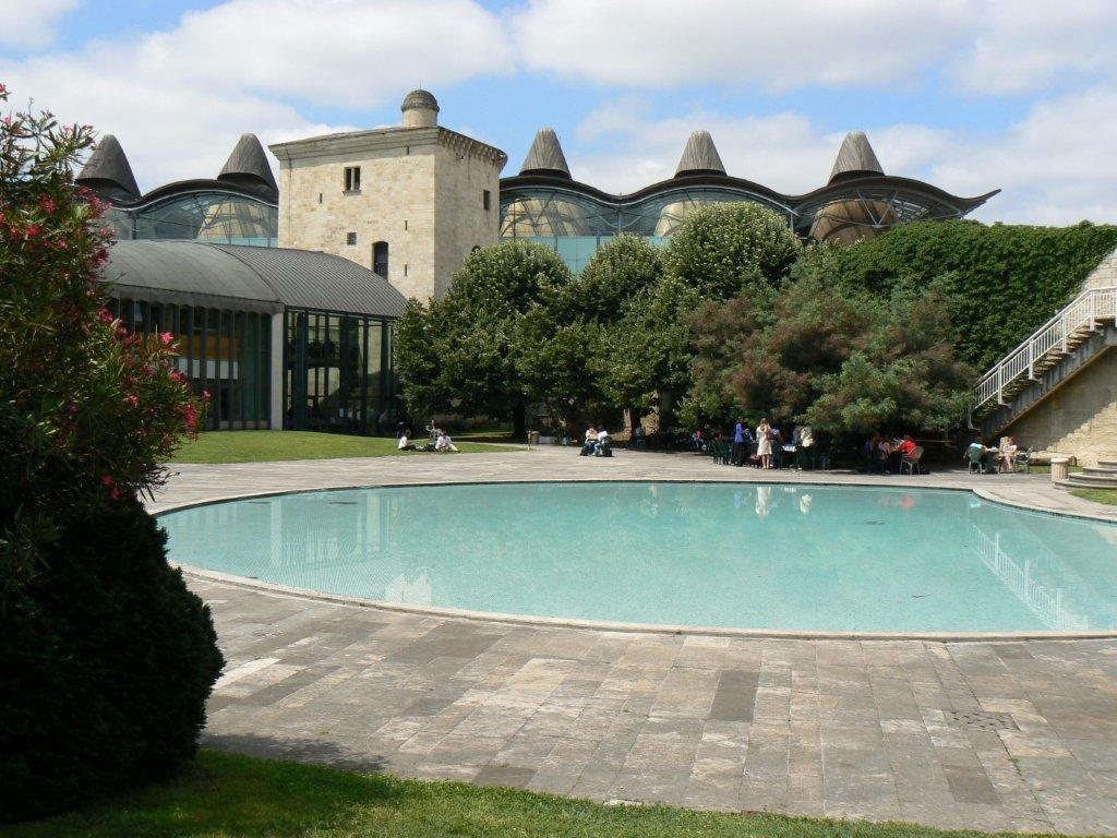 La cour intérieure de l'ENM